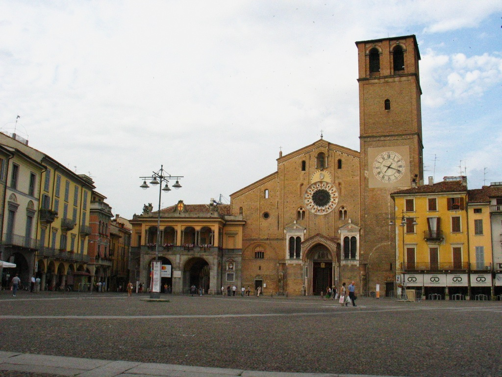 Immagine autoprodotta Lodi - Piazza della Vittoria con ripresa della Cattedrale e, sulla sinistra, il Comune di Lodi.